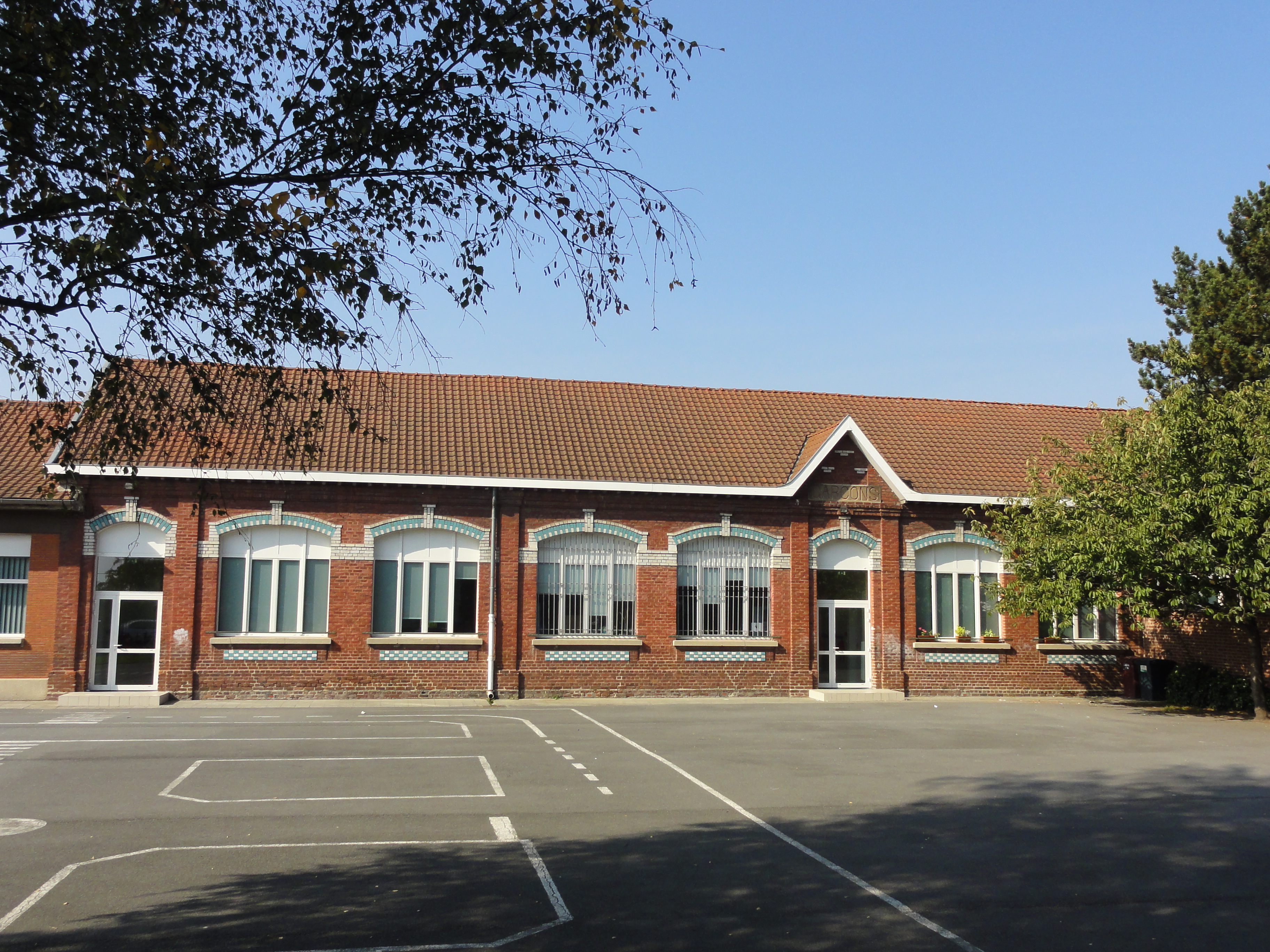 Écoles des cités de la Fosse Cuvinot de la Compagnie des mines d'Anzin, Onnaing, Nord, Nord-Pas-de-Calais, France.